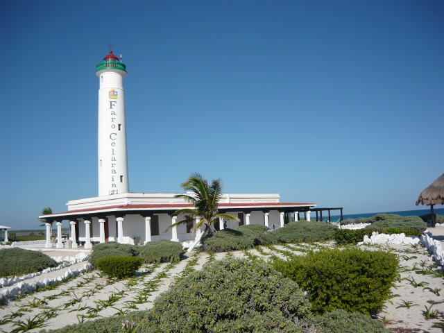 Faro celarain en Punta Sur, Cozumel, Quintana Roo, México. Museo de la navegación.